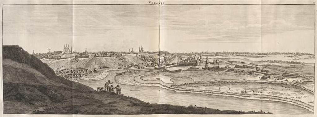 Гравюра Корнелиуса де Бруина, на которой изображён Воронеж 1703 года.